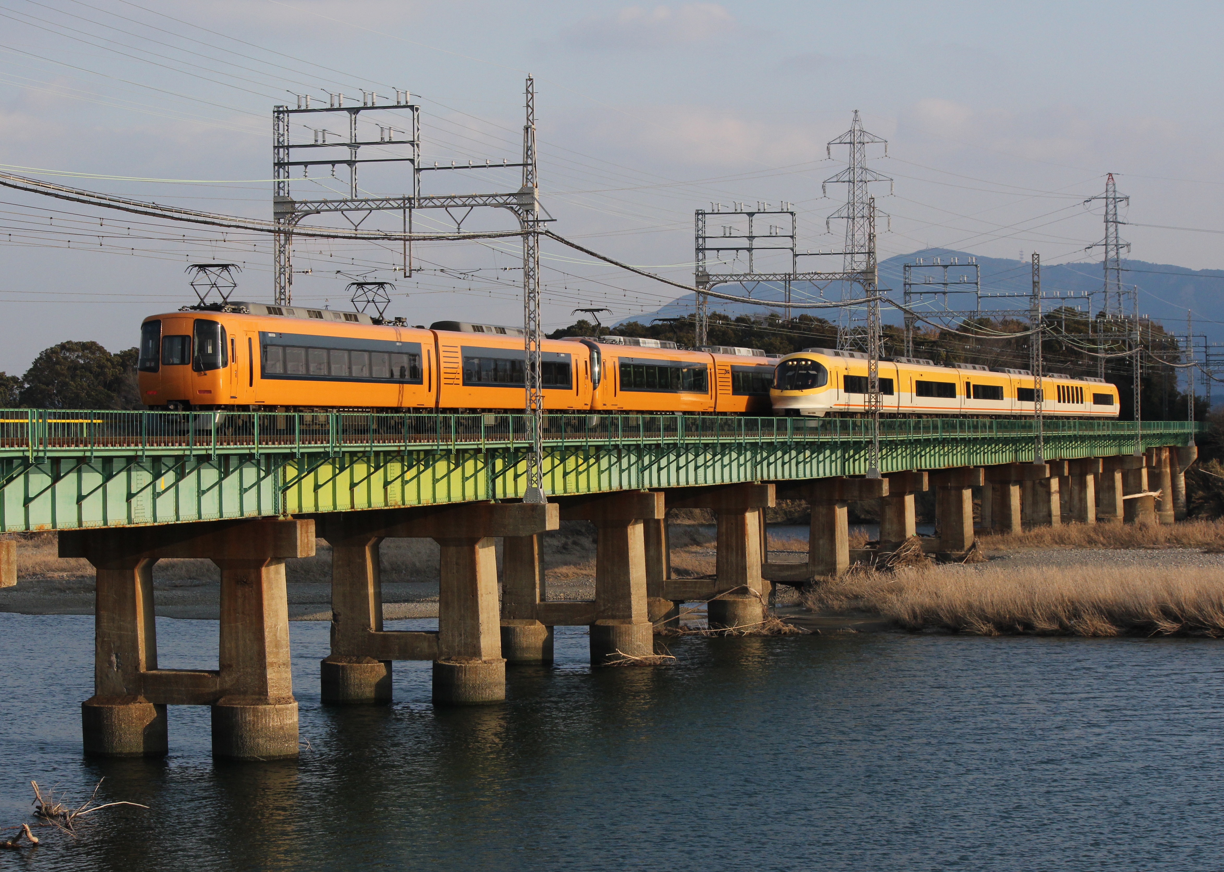 近鉄23000系電車 小俣駅-宮町駅間